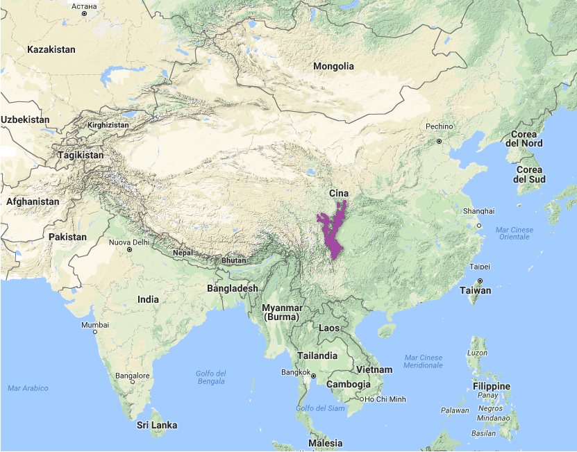 Ecooregione PA0518: Foreste di conifere di Qionglai-Minshan